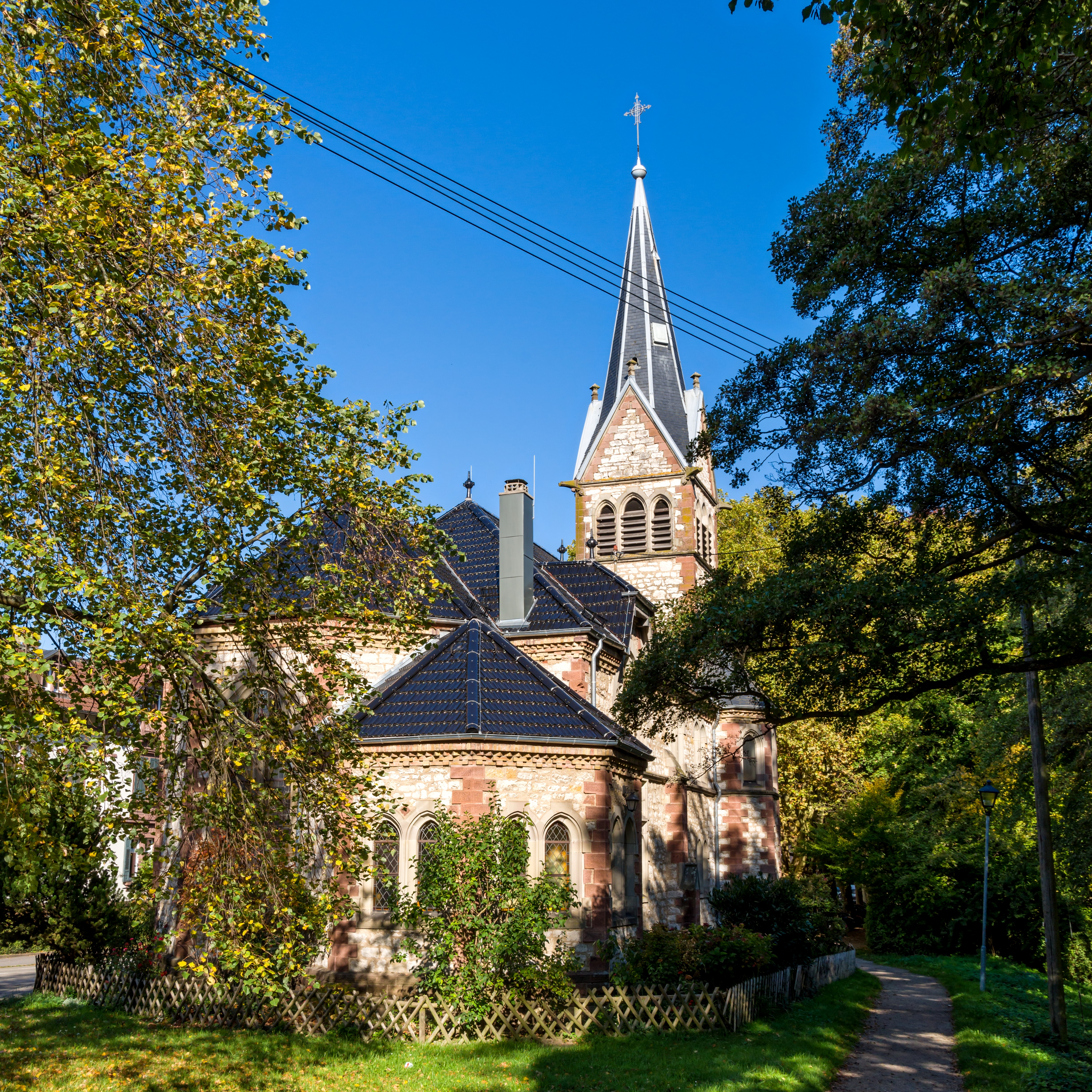 Bilder aus Staufen im Breisgau, die evangelische Luther Kirche